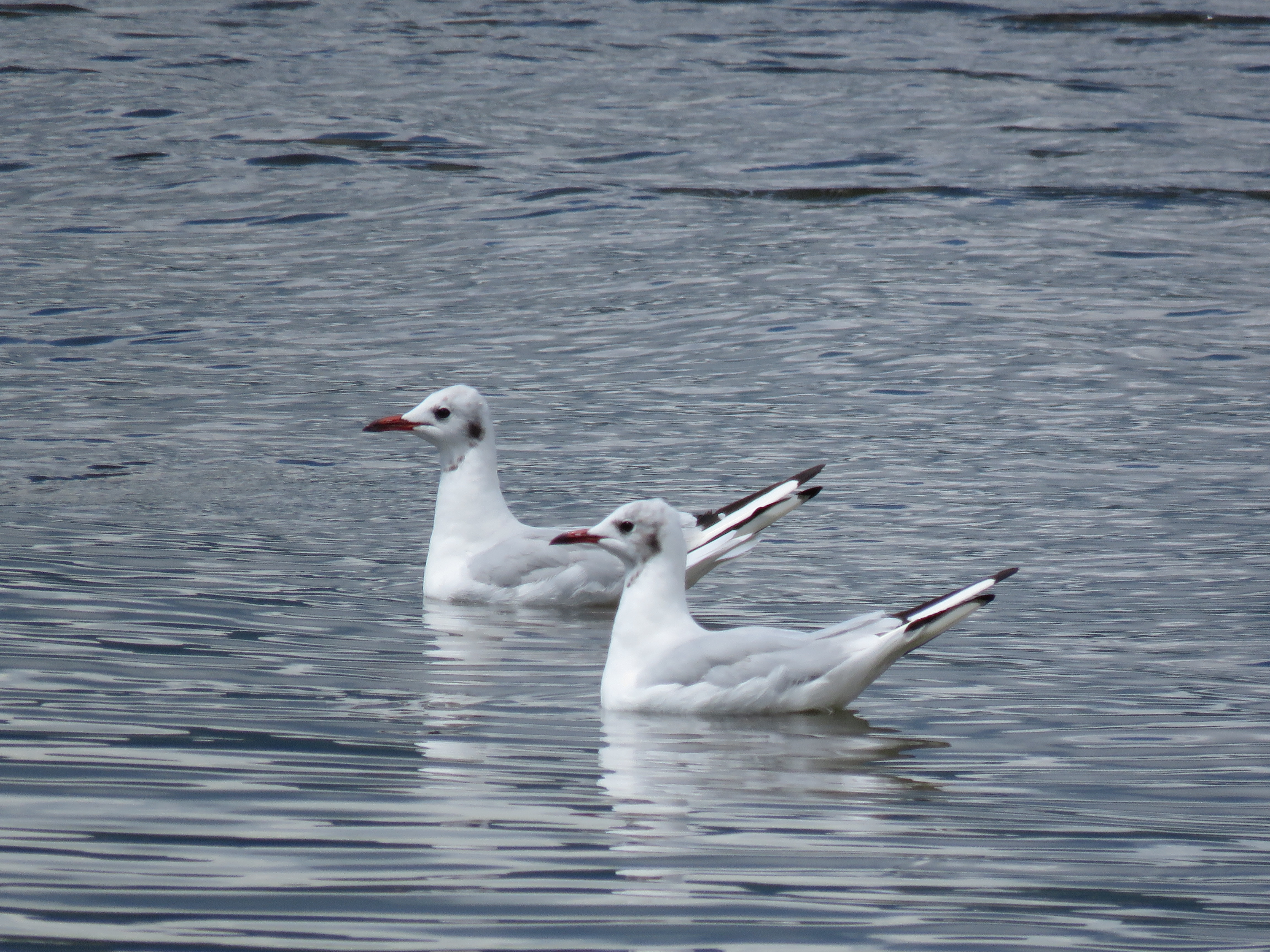 Srpski (latinica): Predstavnici faune ptica Nacionalnog parka Đerdap